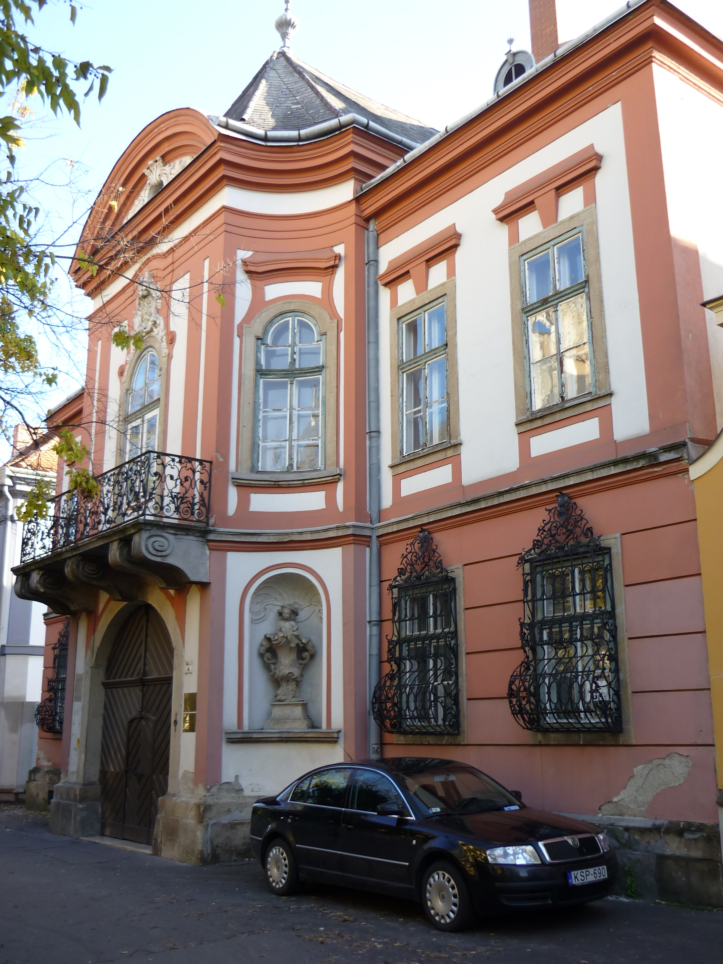 Az egykori kispréposti palota, most a Kulturális Örökségvédelmi Hivatal egri irodája. Műemlék, épült 1758-ban. Tervezte Gerl Mátyás (Eger, Kossuth Lajos utca 4.)